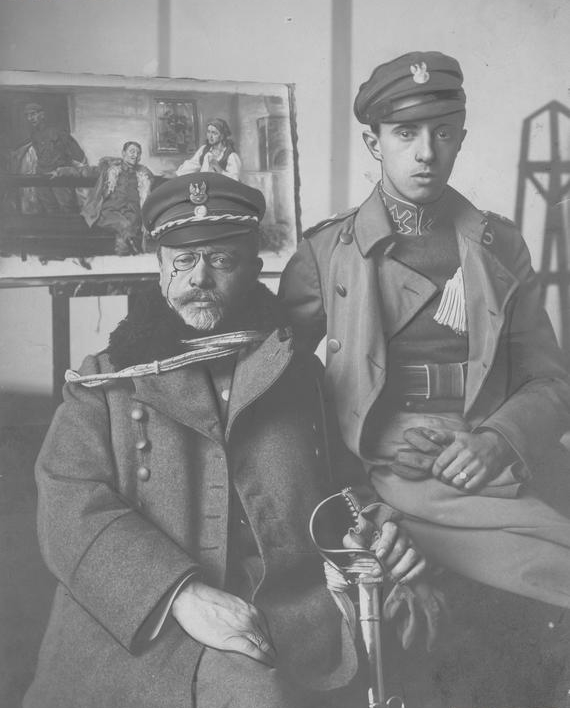 Wincenty Wodzinowski (artysta malarz) w mundurze legionowym z synem.